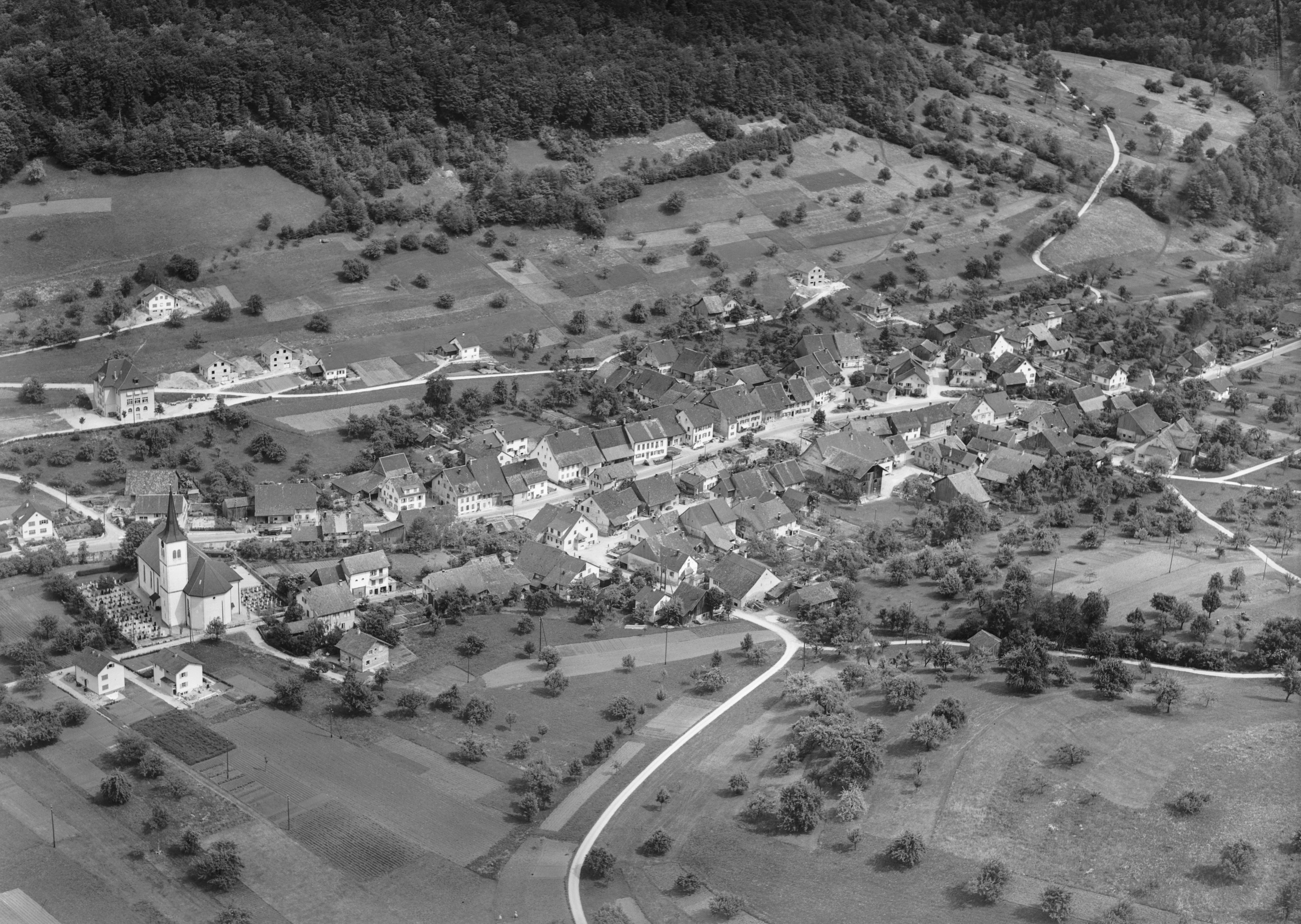 Tiefgeflogen